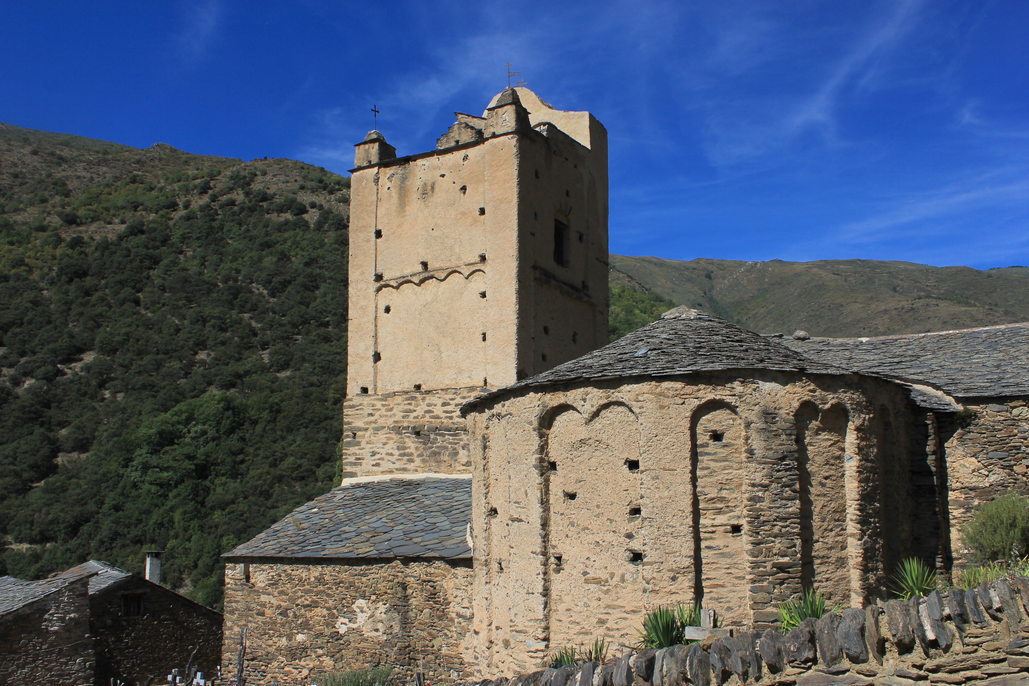 Evol-France Pyrénées orientales un des plus beaux villages de France